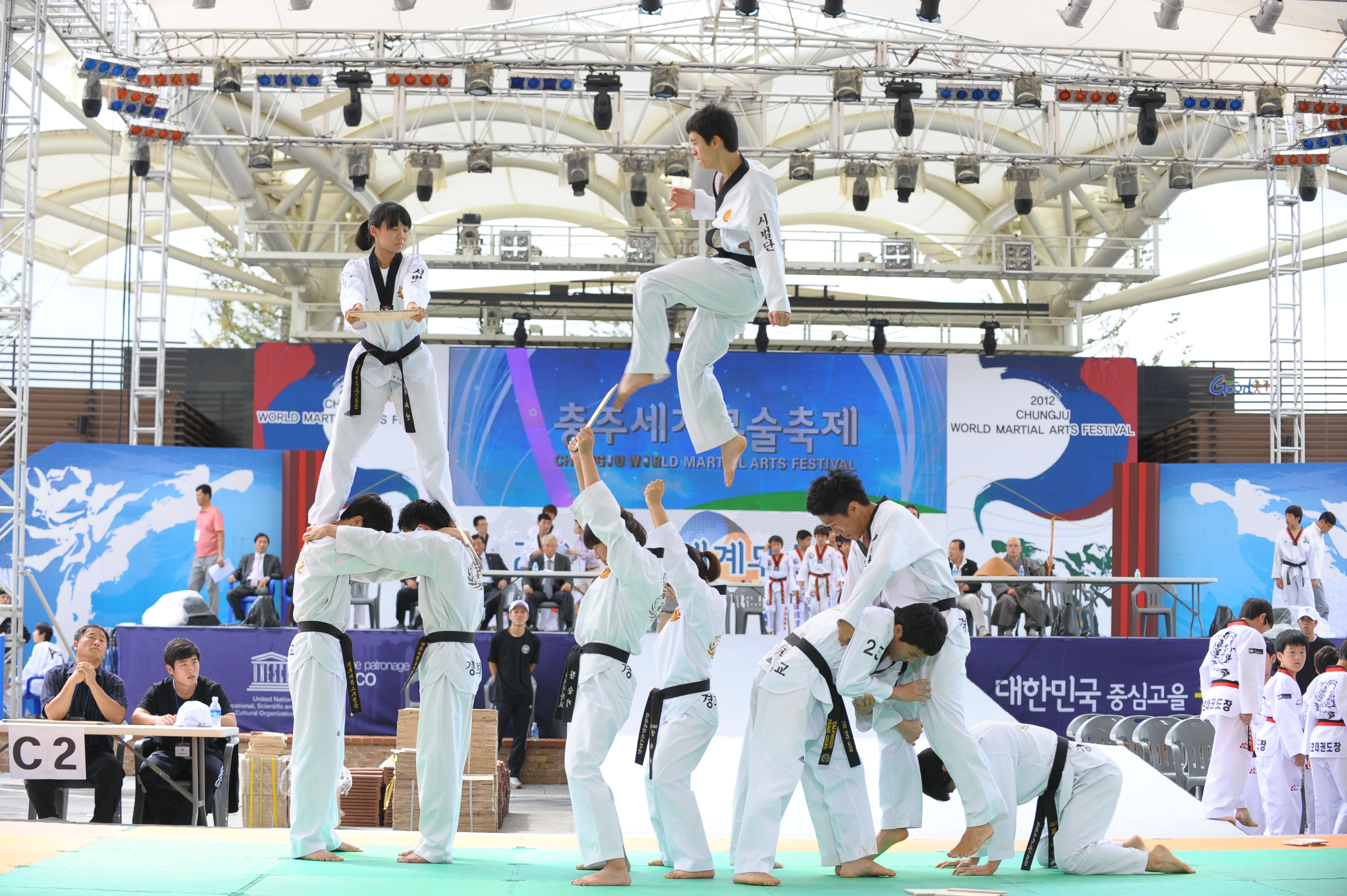 태권도 등 무술시연 행사